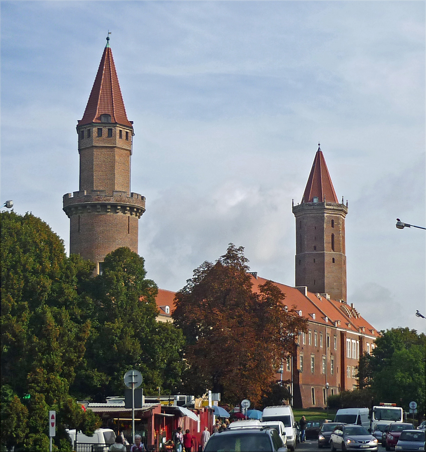 Piastenschloss in Liegnitz/Legnica